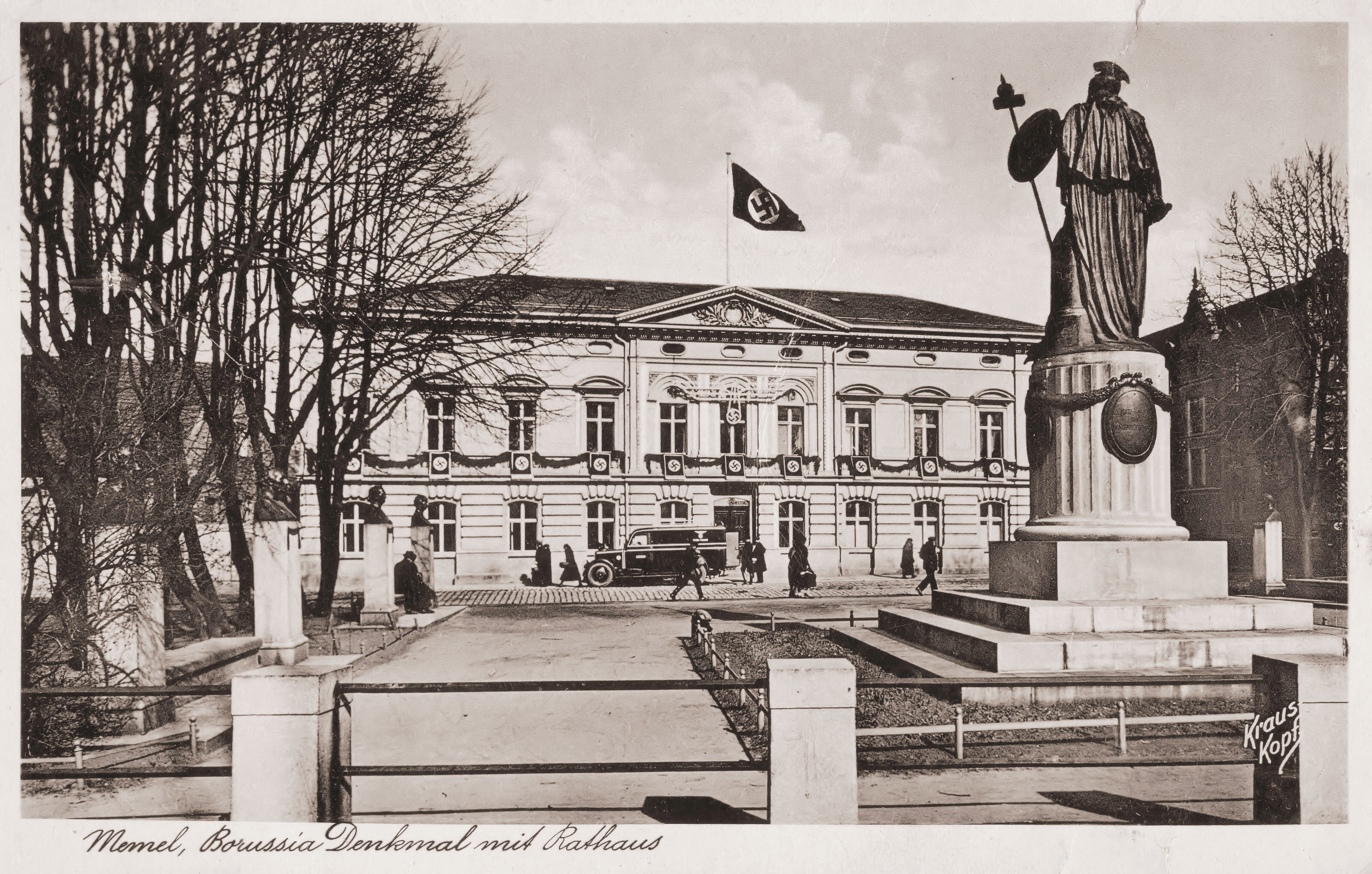 Socha Borussia a Klaipėdská radnice s hákovým křížem v listopadu r. 1939